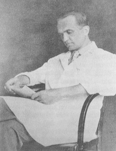 Prof. MUDr. František Šimer, okolo 1938